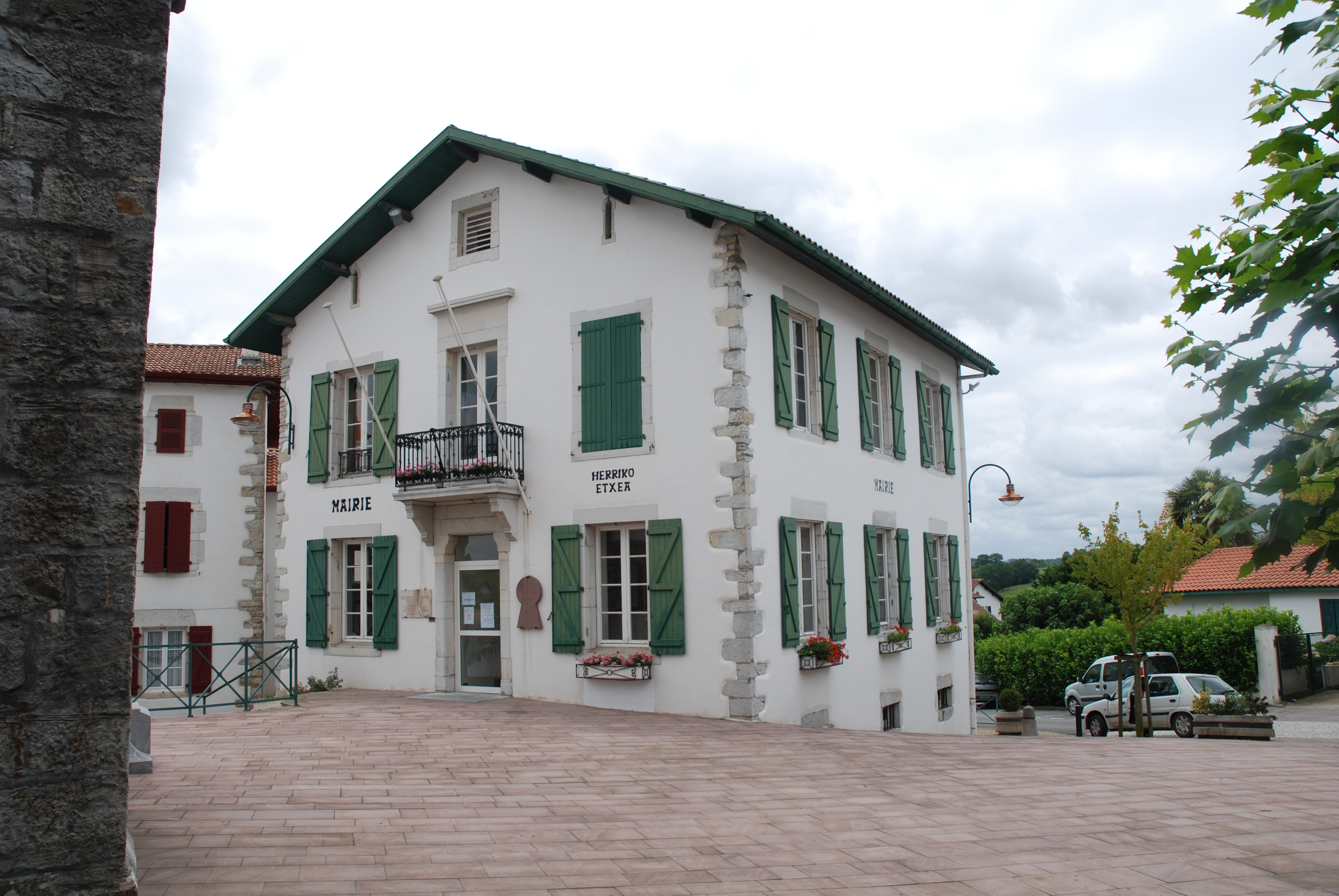 Briscous, la mairie